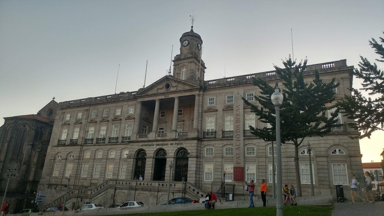 Palacio de Bolsa, Porto, Portugal